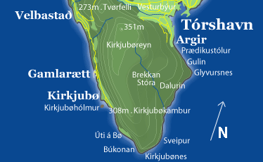 Kirkjubøurs beliggenhed på Streymoy, Færøerne